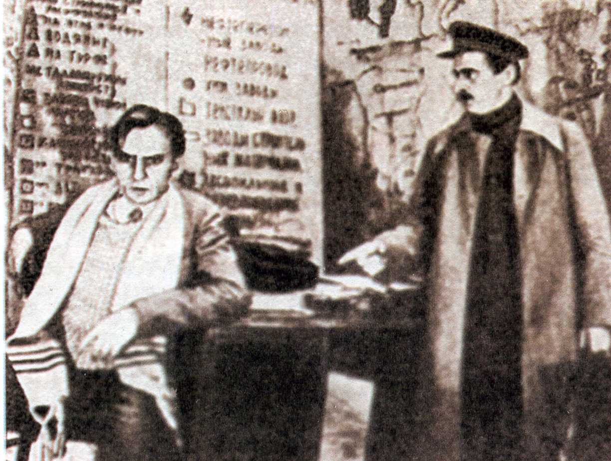 Беларуская (тарашкевіца): Сцэна з спэктаклю «Мой сябра» М. Пагодзіна на сцэне Беларускага трэцяга дзяржаўнага тэатру